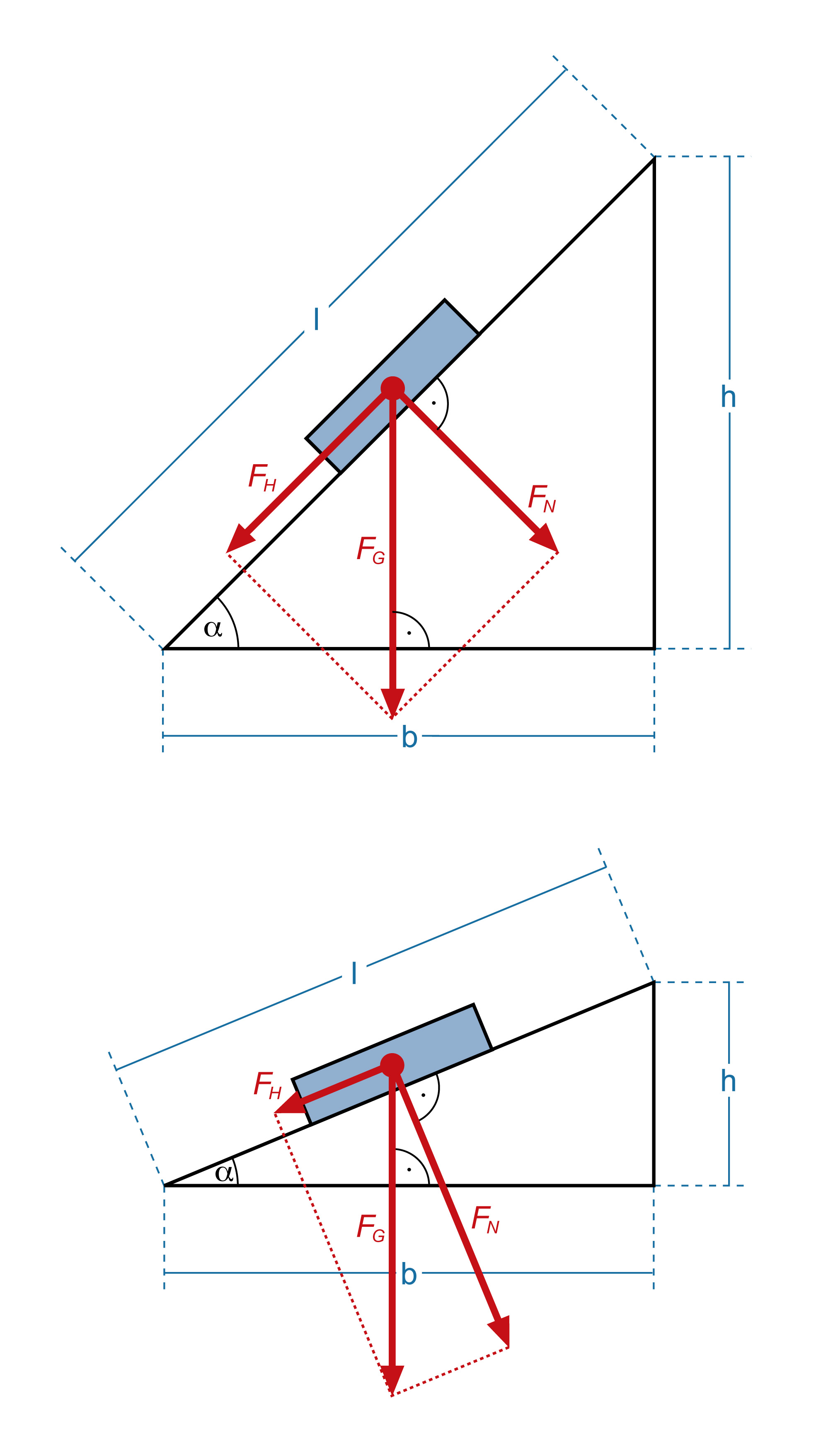 Schiefe Ebene. Eigene Zeichnung, GNU FDL